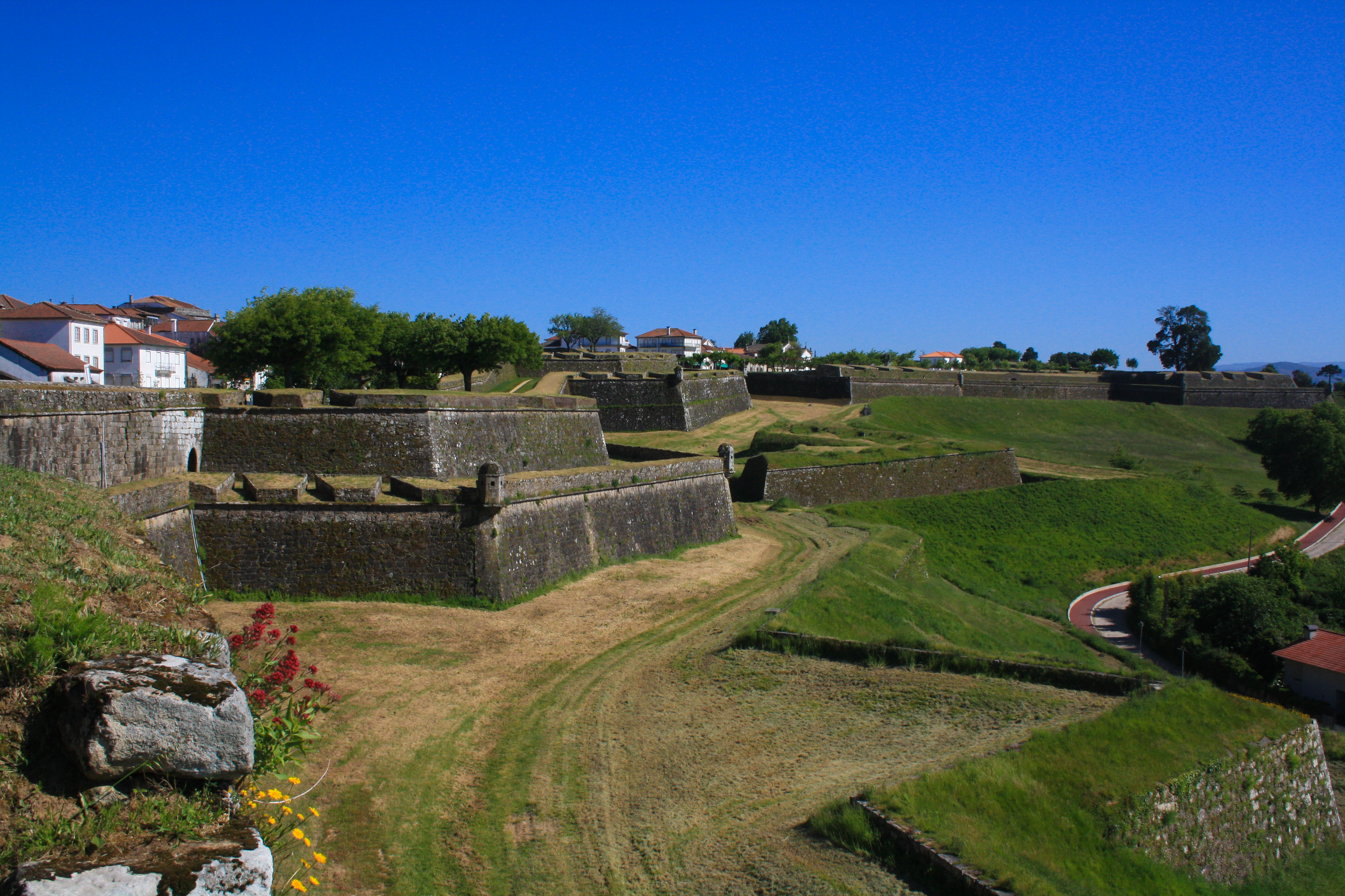 Castelo de Valença